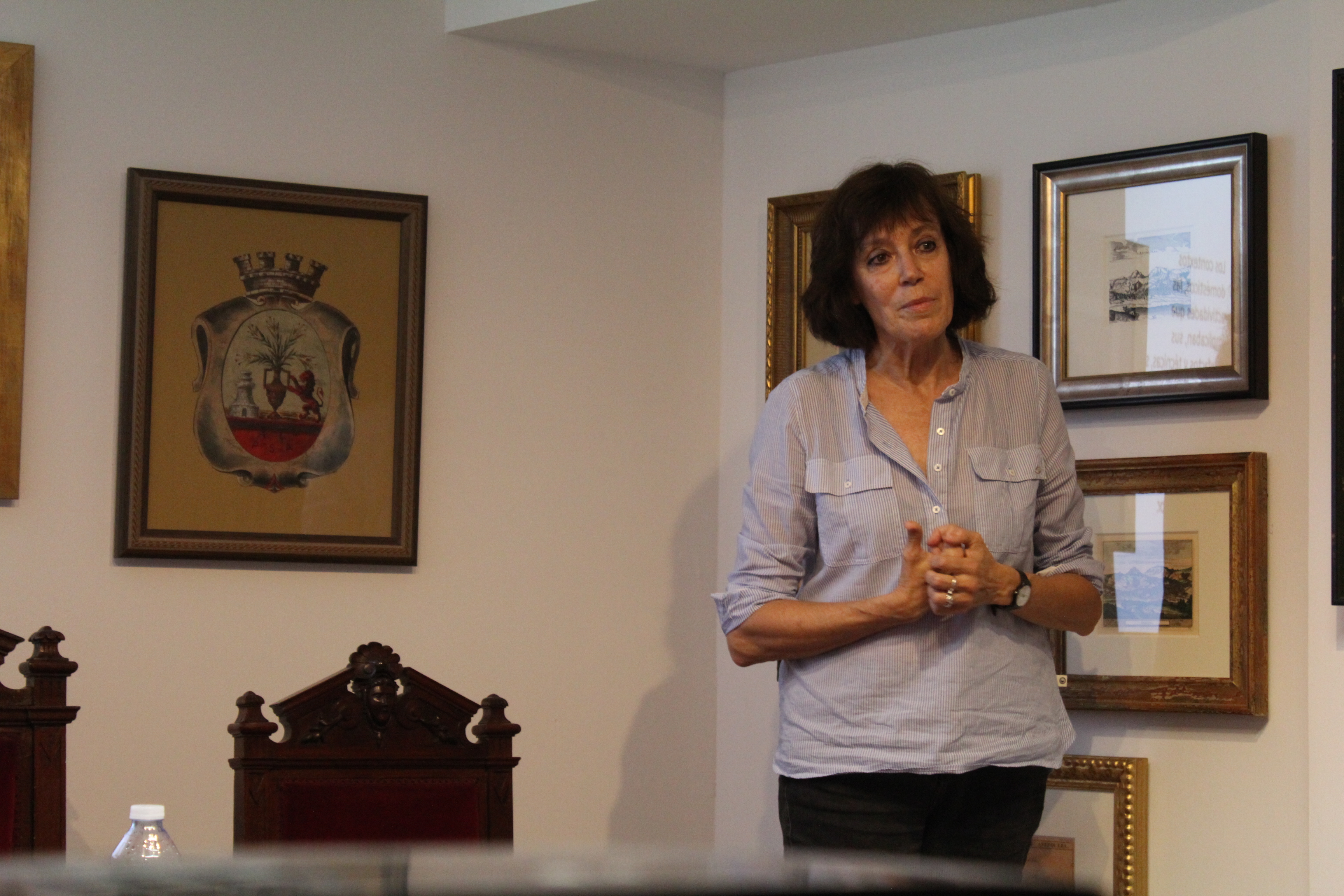 Marina Picazo durante una conferencia en la Real Academia de Nobles Artes de Antequera